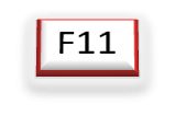 F11-Taste